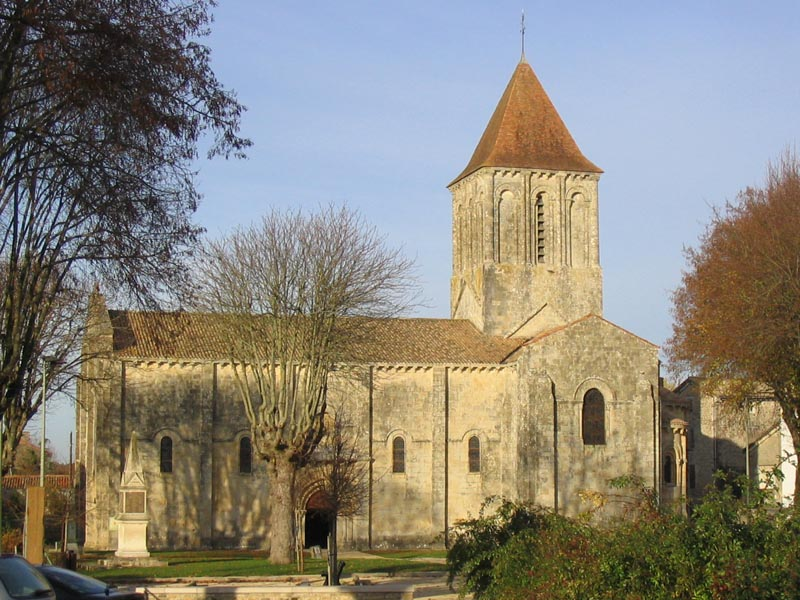 Eglise de Saint Pierre à Melle (Deux-Sèvres) en France. Eglise romane du début du XIIe siècle.